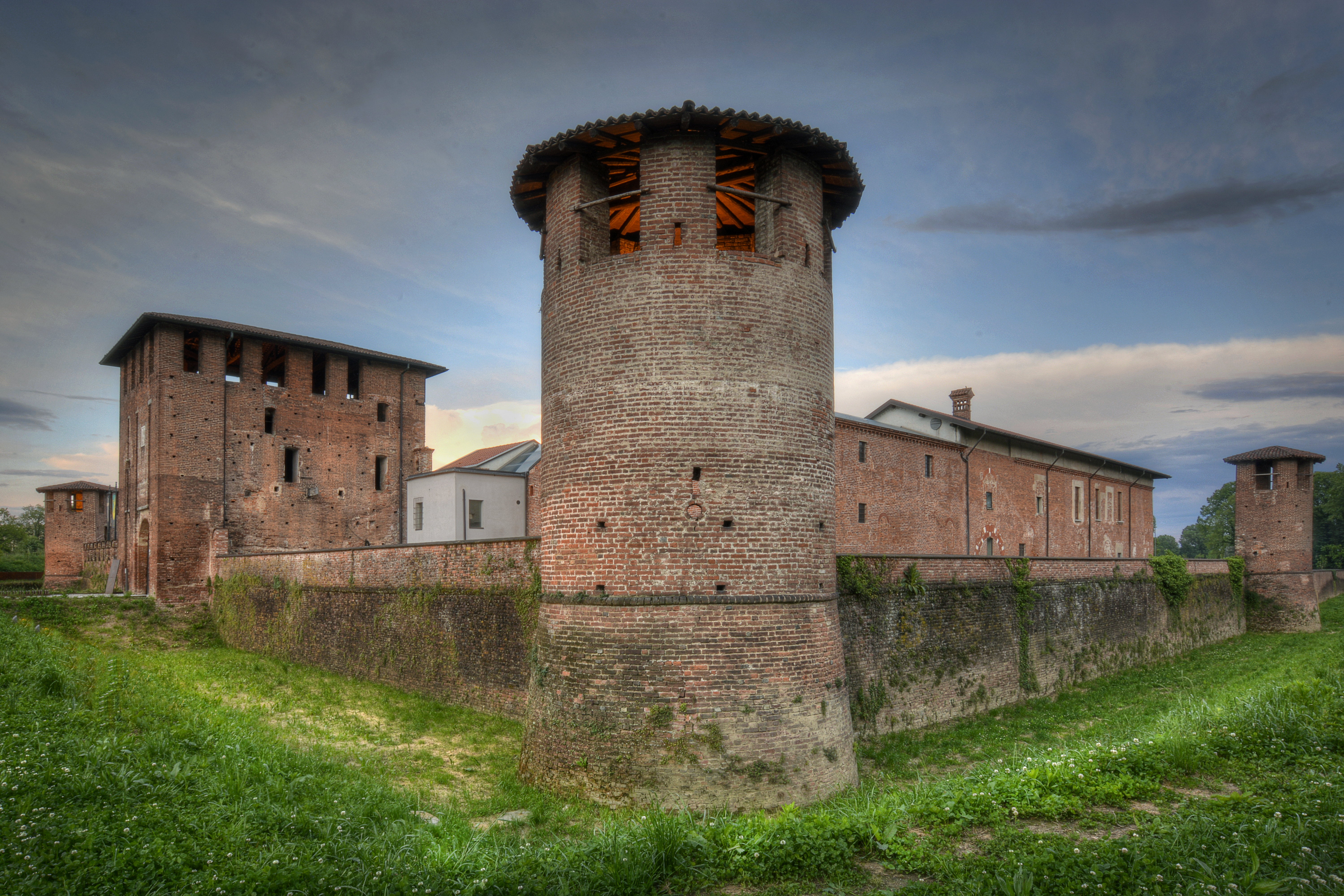 Q3662653 This is a photo of a monument which is part of cultural heritage of Italy.